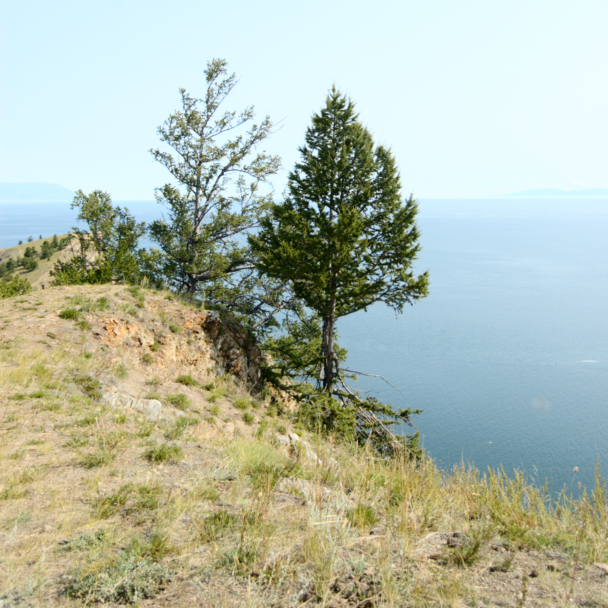 Larix × czekanowskii, Khoboy cape, Olkhon